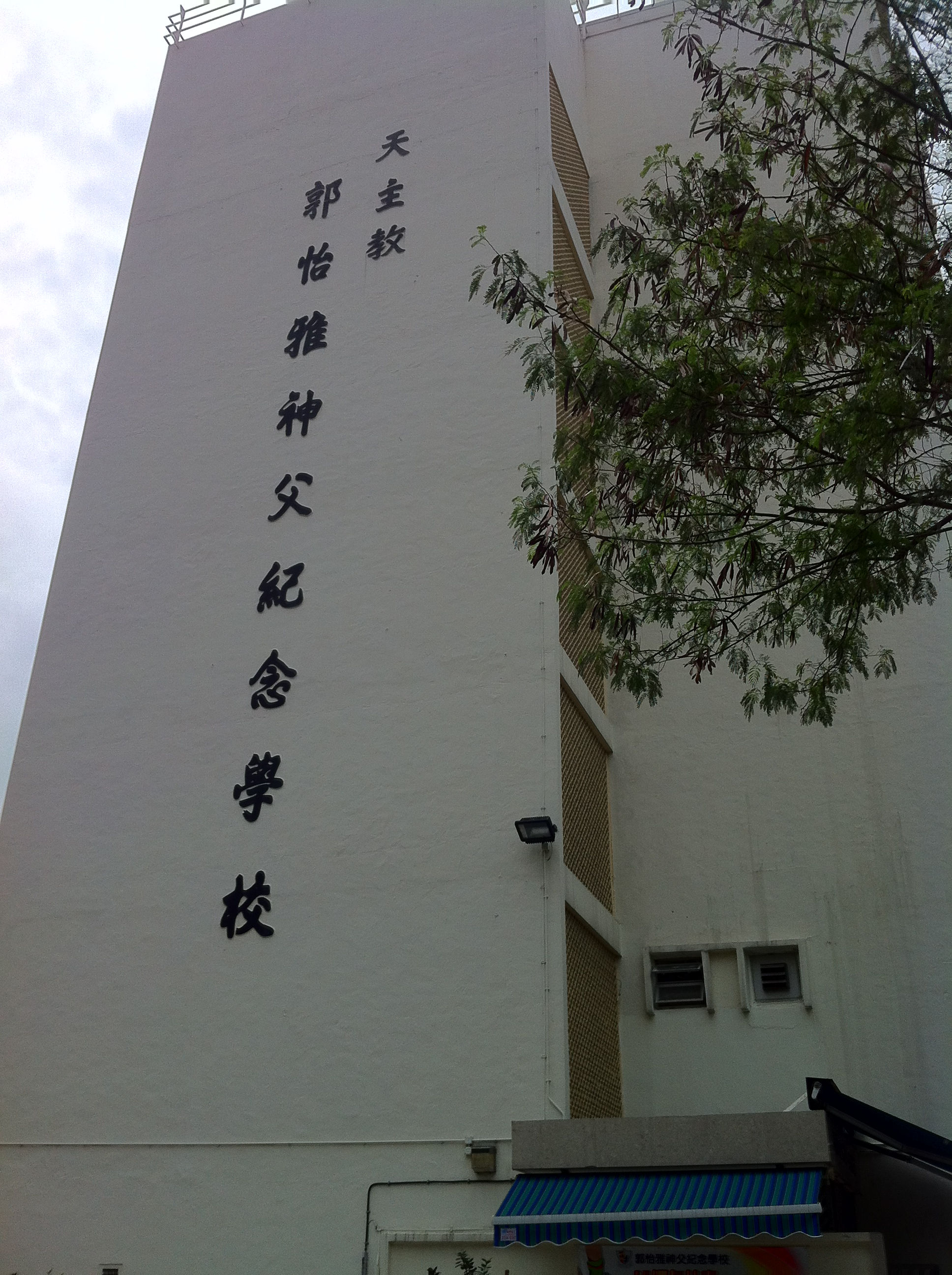 中文（香港）: 郭怡雅神父紀念學校外貌, 香港, 中國